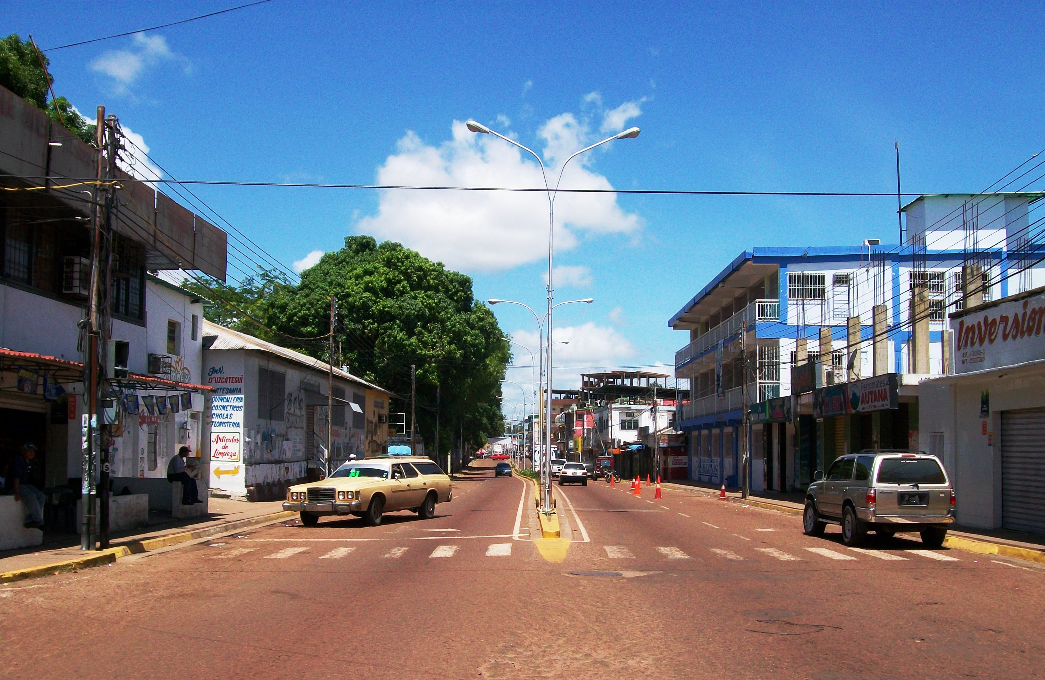 la avenida orinoco pasa por todo el centro de puerto ayacucho desde el centro asta casi el muelle,tiene granimportancia comercial,es la mas importante y la principal de puerto ayacucho,venezuela